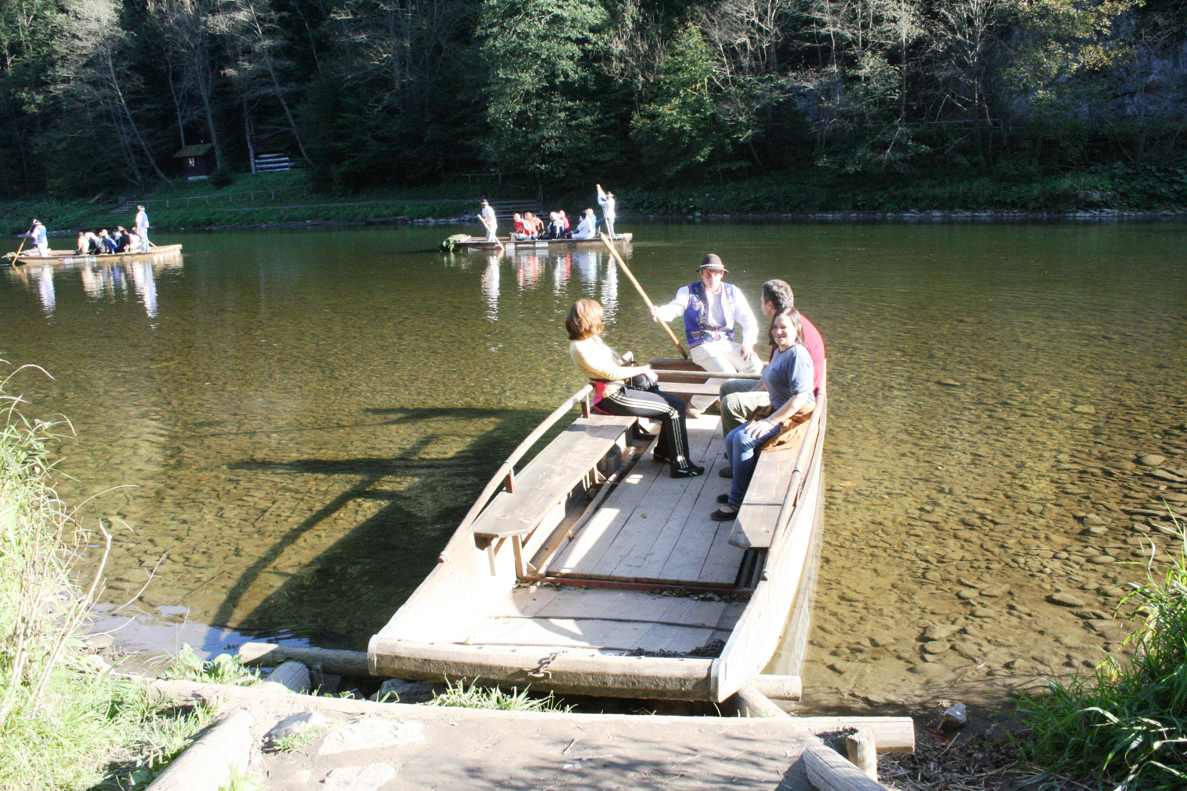 Prom na Dunajcu – Nowy Przewóz